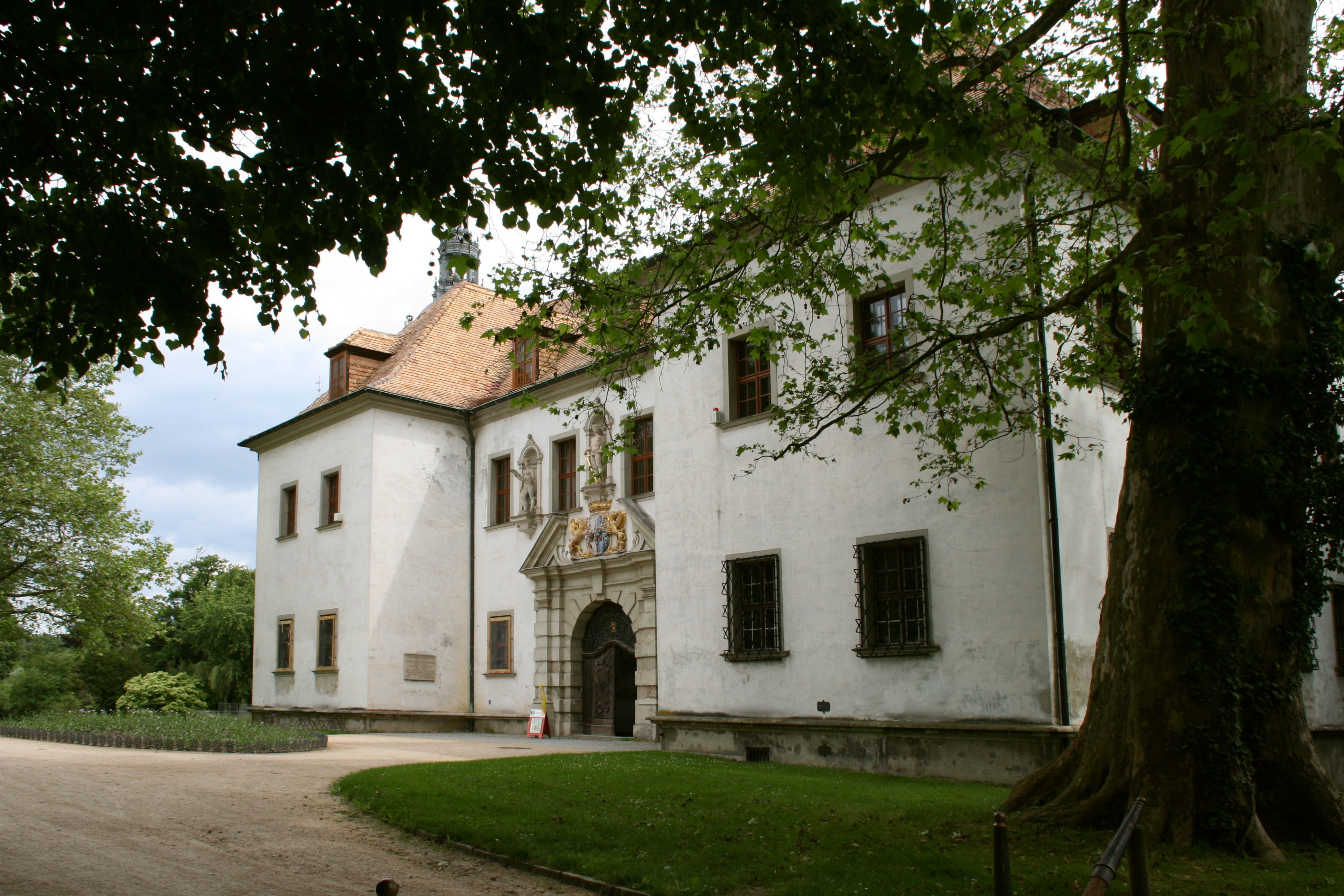 Altes Schloss in Bad Muskau